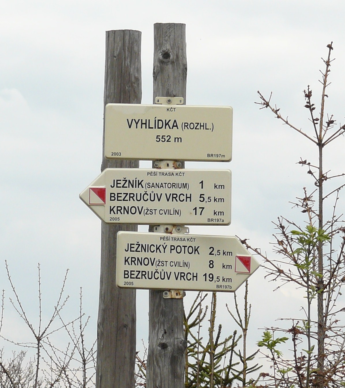 Krnov - szczyt Vychlidki. Węzeł szlaków.